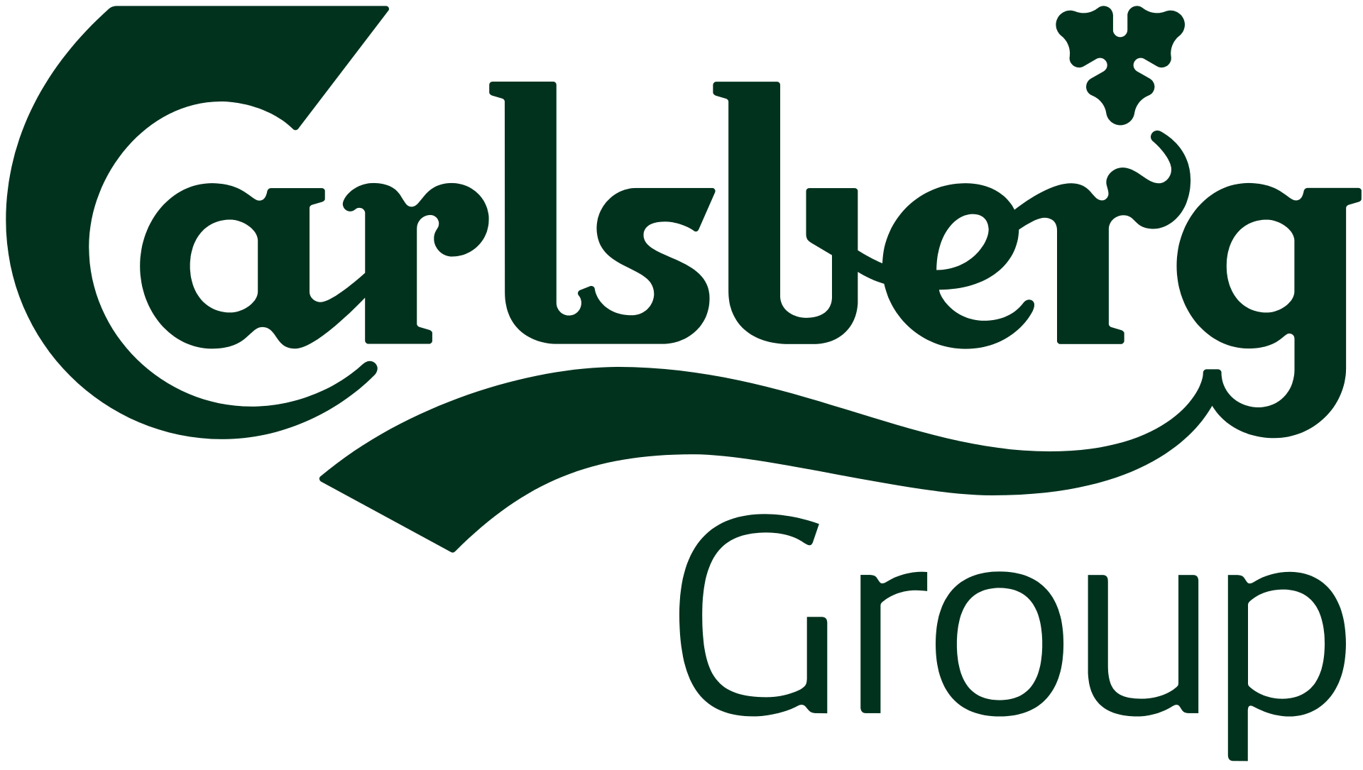 Carlsberg